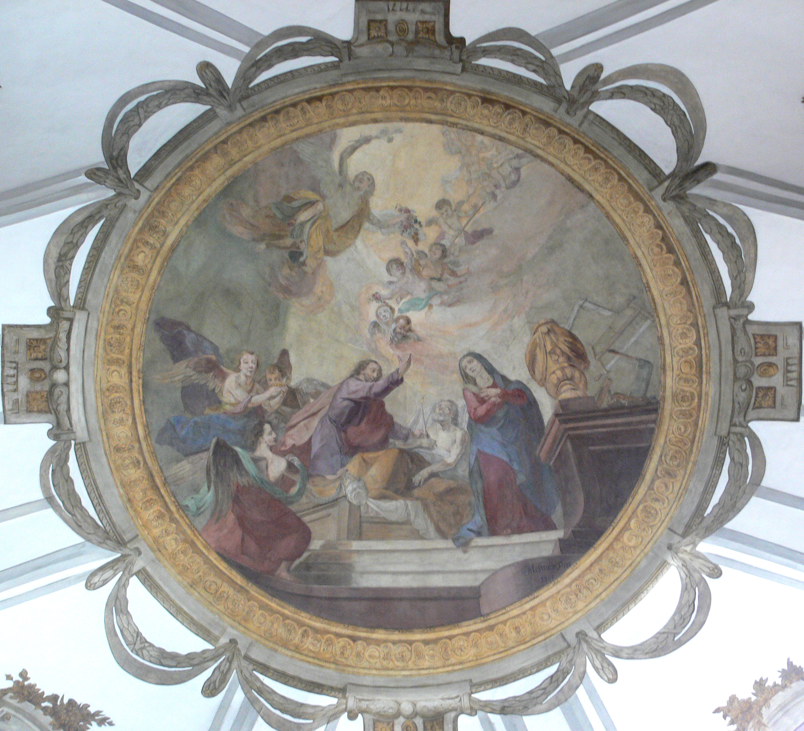 Pfarrkirche St. Martin, Aulendorf, Landkreis Ravensburg Sebastianskapelle (Gruftkapelle der Grafen von Königsegg) Deckenfresko „Tod des hl. Josef“ von Josef Anton Mesmer, 1801